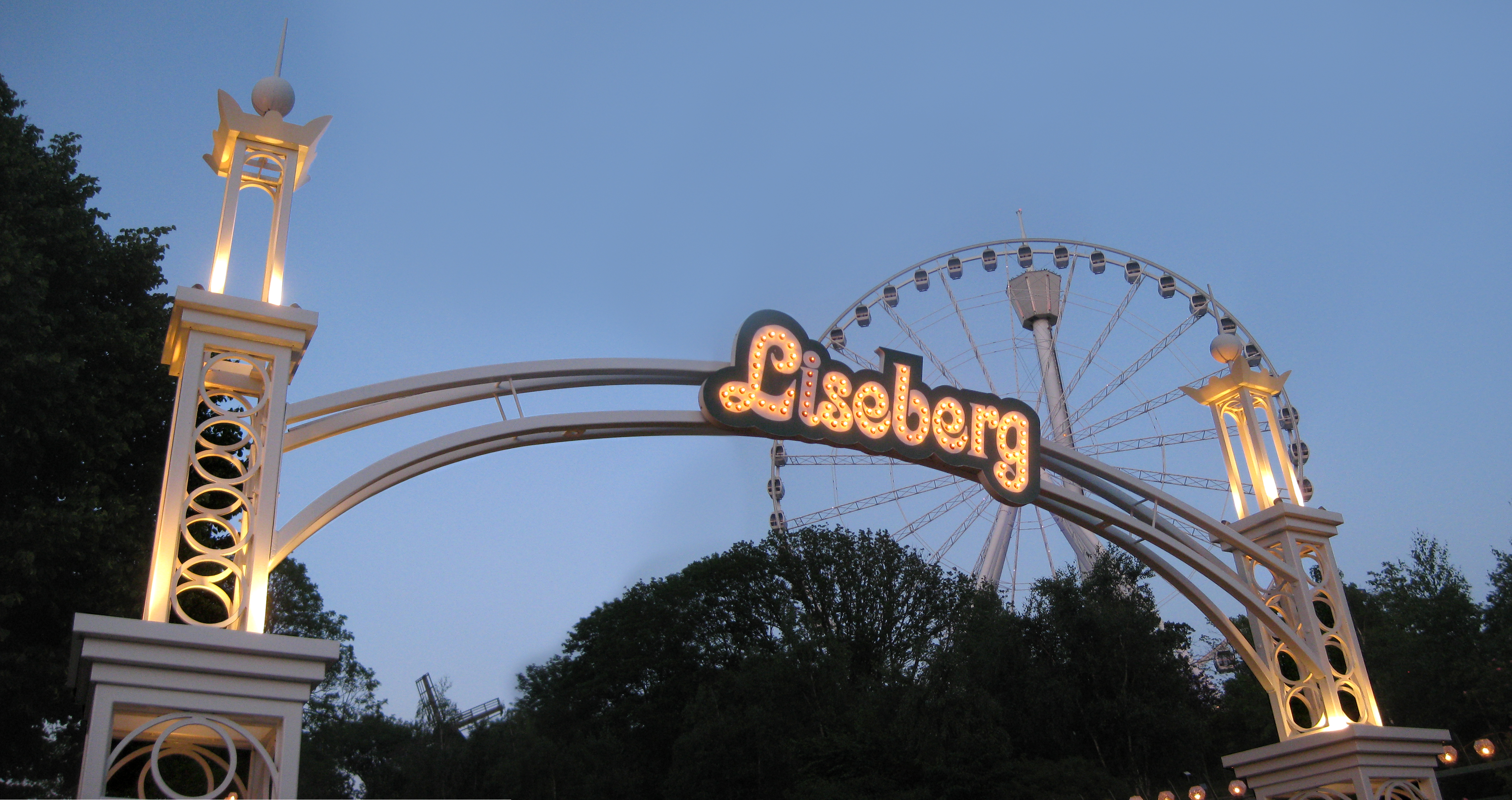 Den första portalen på gångvägen (Stjärnstigen) mellan Korsvägen och Lisebergs södra entré.